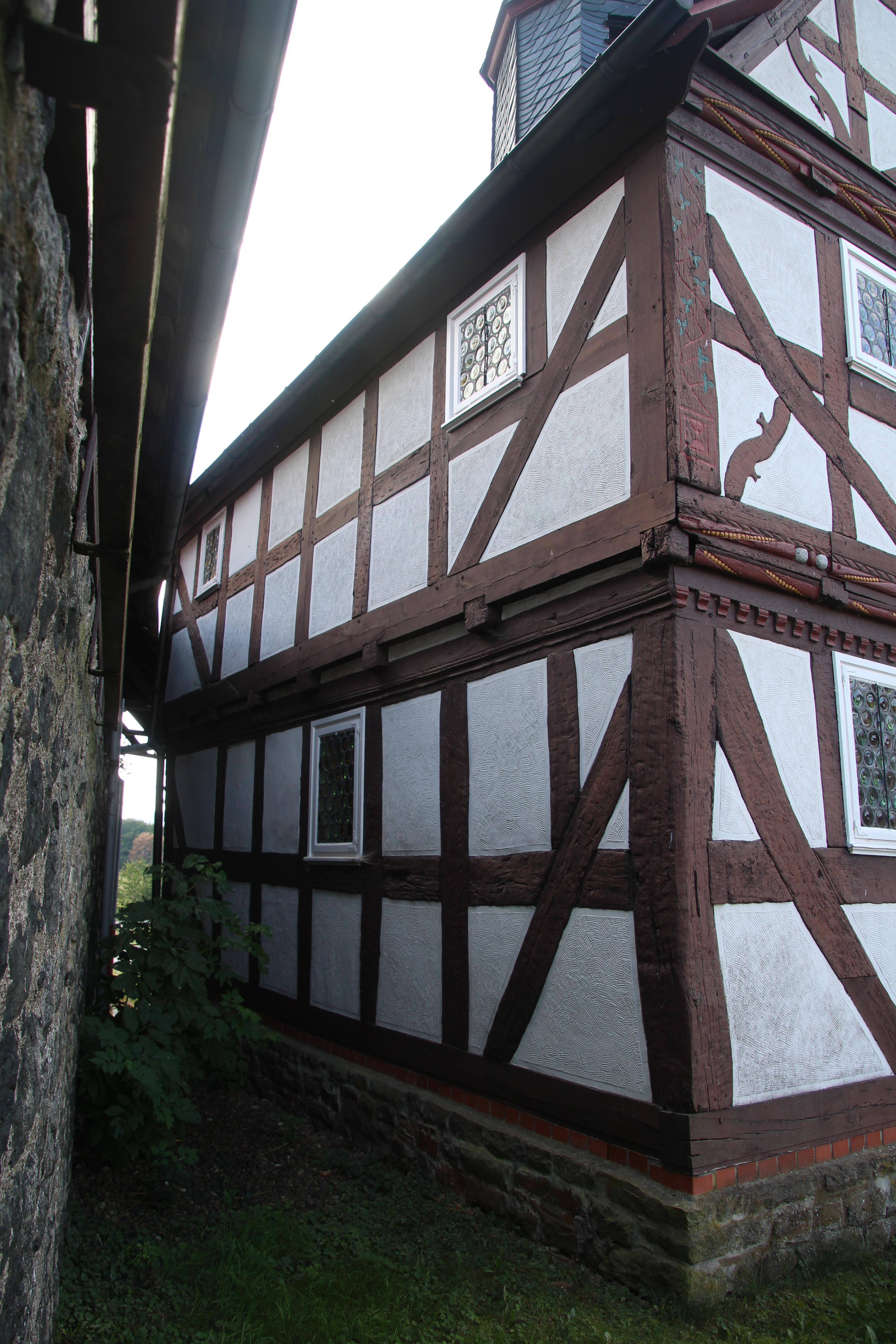 Kapelle Rachelshausen